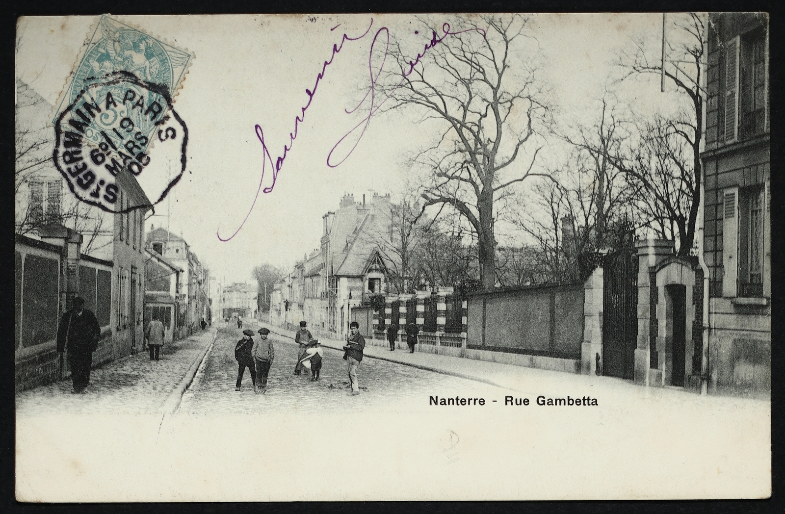 Nanterre.Rue Gambetta.1905